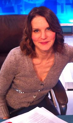 Susie Dent, lexicografa de Countdown